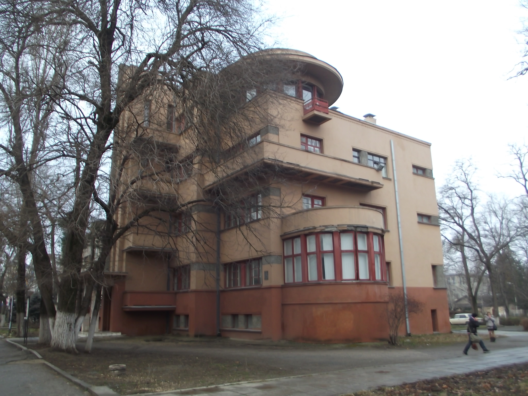 Будинок житловий Кримського уряду, Сімферополь, вул. Жуковського, 5, 5а, літер «А»